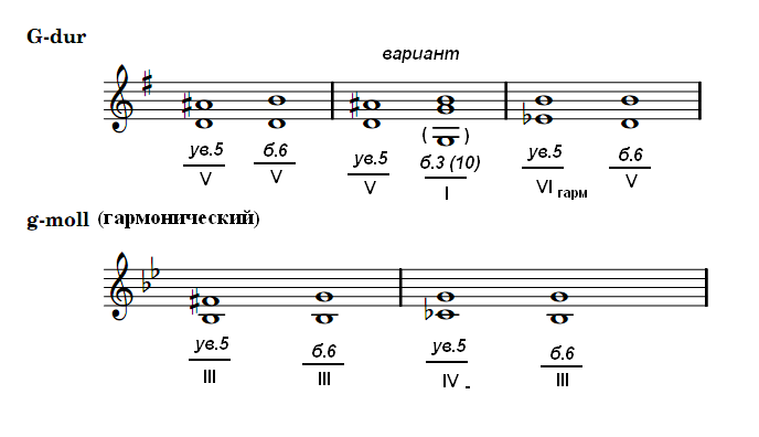 Павялічаныя квінты ў ладу